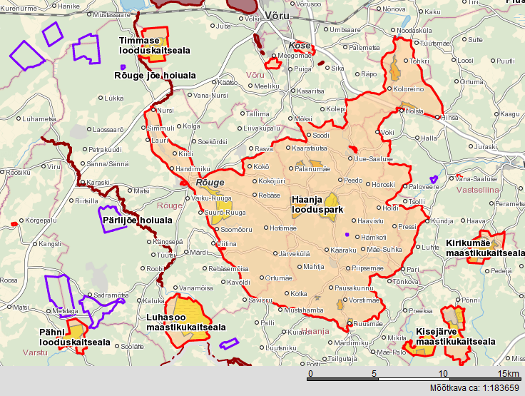 Haanja looduspark ja lähedalasuvad kaitsealad Maa-ameti kaardil.